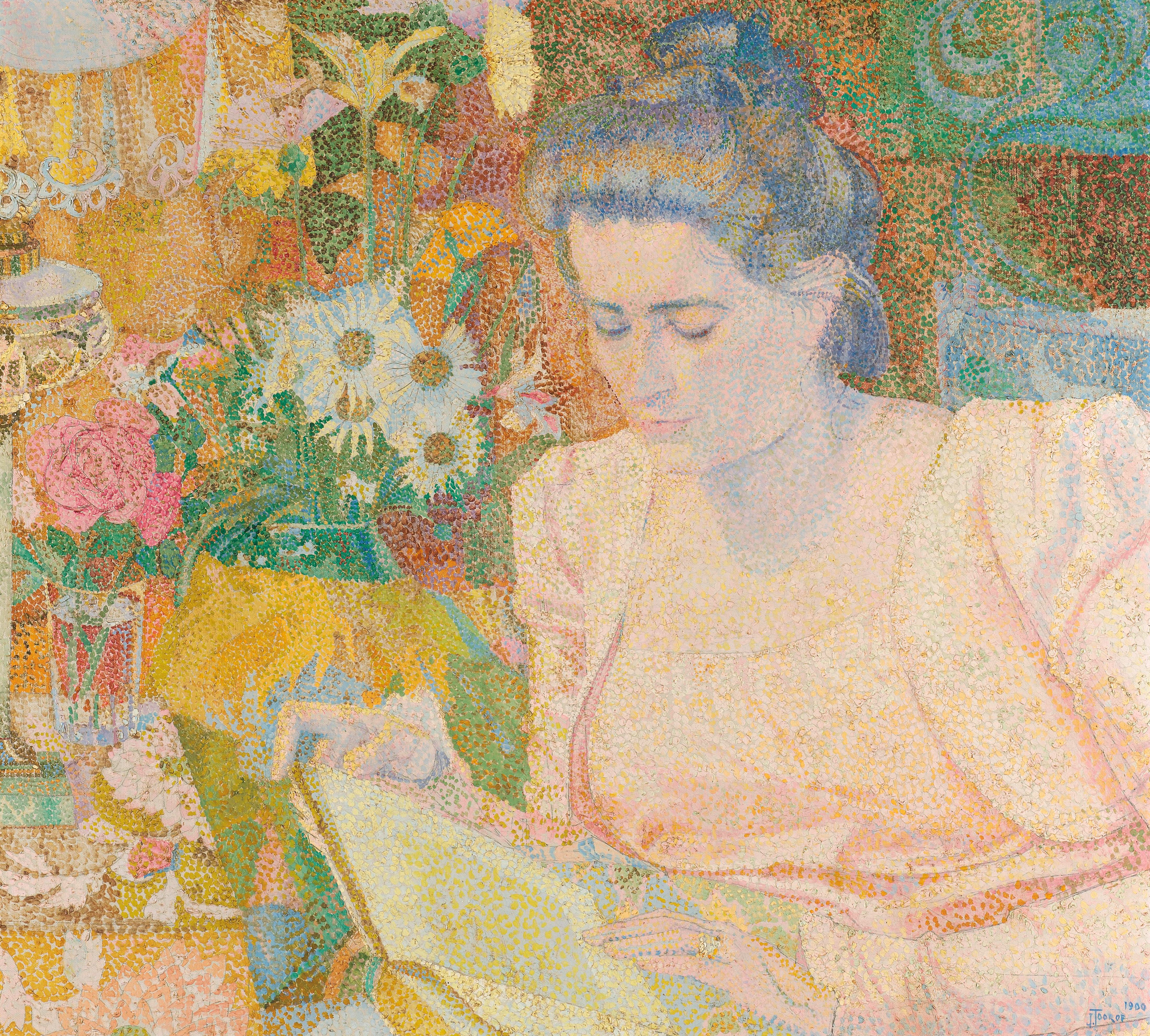 Het schilderij is geschilderd in een pointillistische techniek. De geportretteerde is rechts geplaatst, toegewend naar de beschouwer, terwijl zij in het licht van een petroleumlamp een boek bestudeert. Ze is gekleed in een roze japon, zg. reformkleding, en heeft het haar eenvoudig opgestoken. Op de tafel links is deels de petroleumlamp te zien, geplaatst naast een vaasje rozen op een tafeltje bedekt met een gebloemd kleed. Bloemen in een grote vaas op de achtergrond worden visueel opgenomen in het patroon van het decoratieve behang.; Jan Toorop (1858–1928), olieverf op doek, 1900